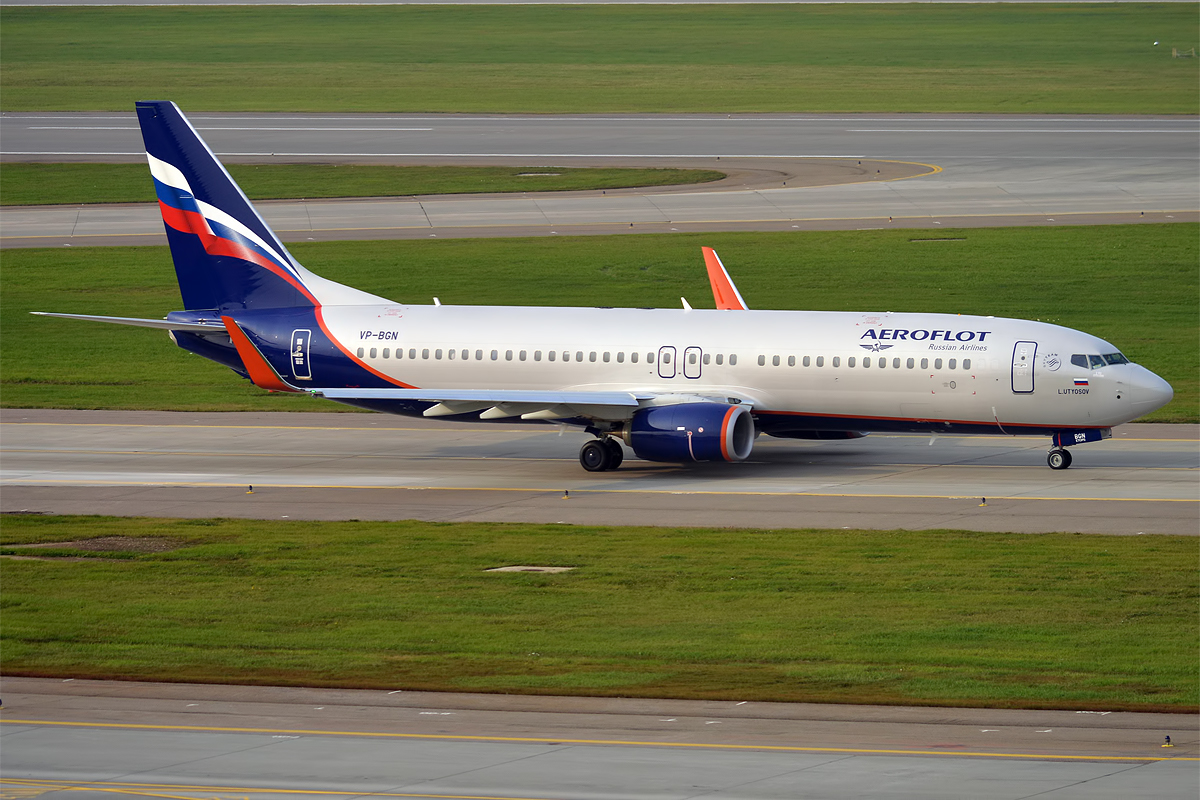 Aeroflot, VP-BGN, Boeing 737-8LJ